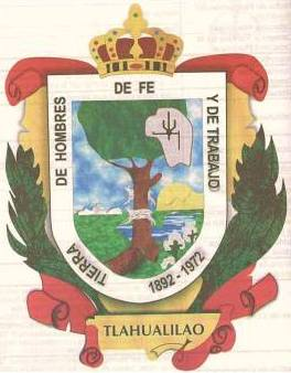 Fue diseñado ajustándose a la más estricta realidad y representatividad. Toma elementos del escudo del estado de Durango.